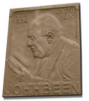 Gedenkplaat Johan Been Kunstenaar: Martinus Leonardus Middelhoek